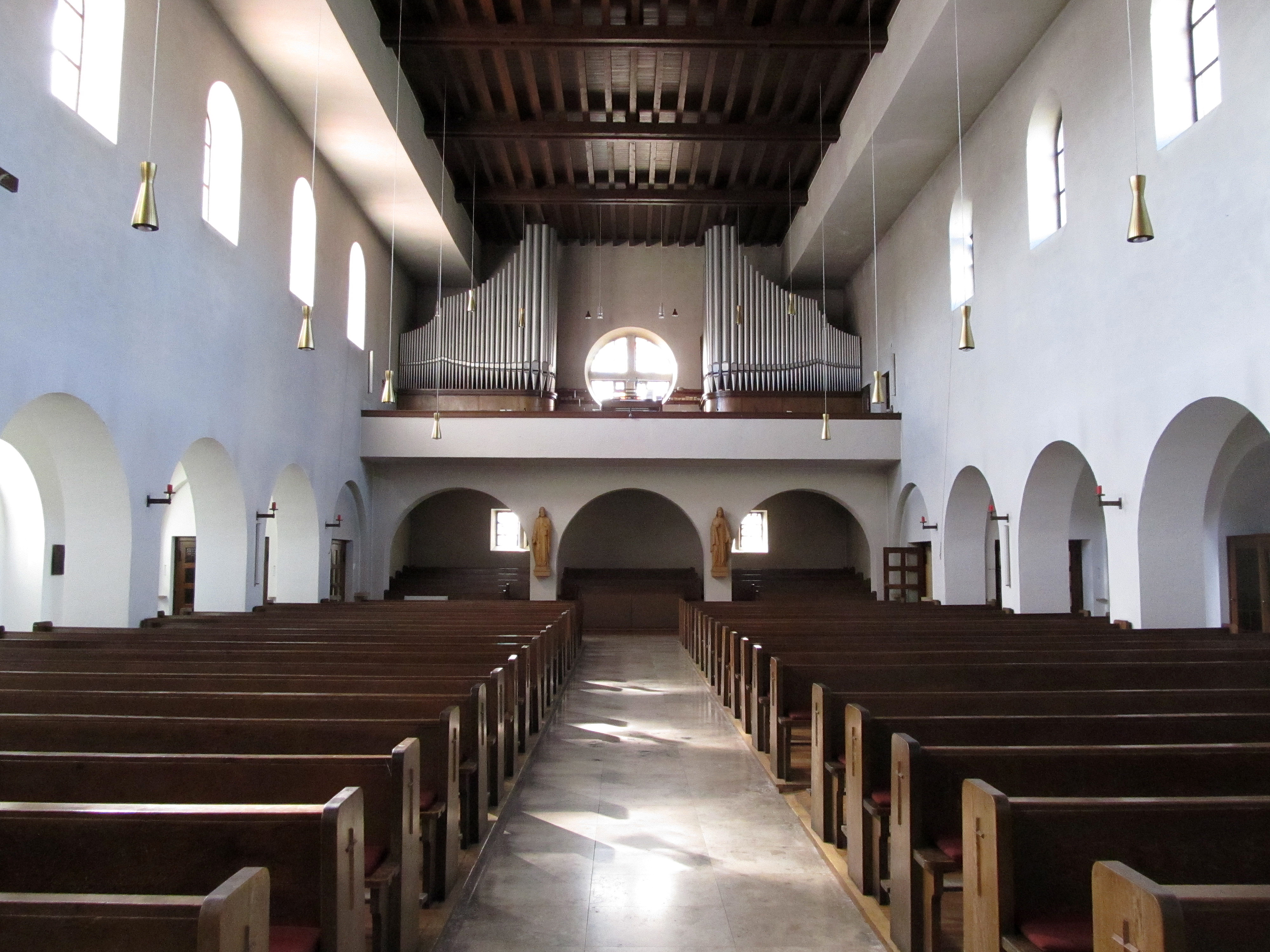 Blick vom Altarraum zur Empore und dem Orgelprospekt der katholischen Pfarrkirche St. Mauritius in Ormesheim, Gemeinde Mandelbachtal, Saarland